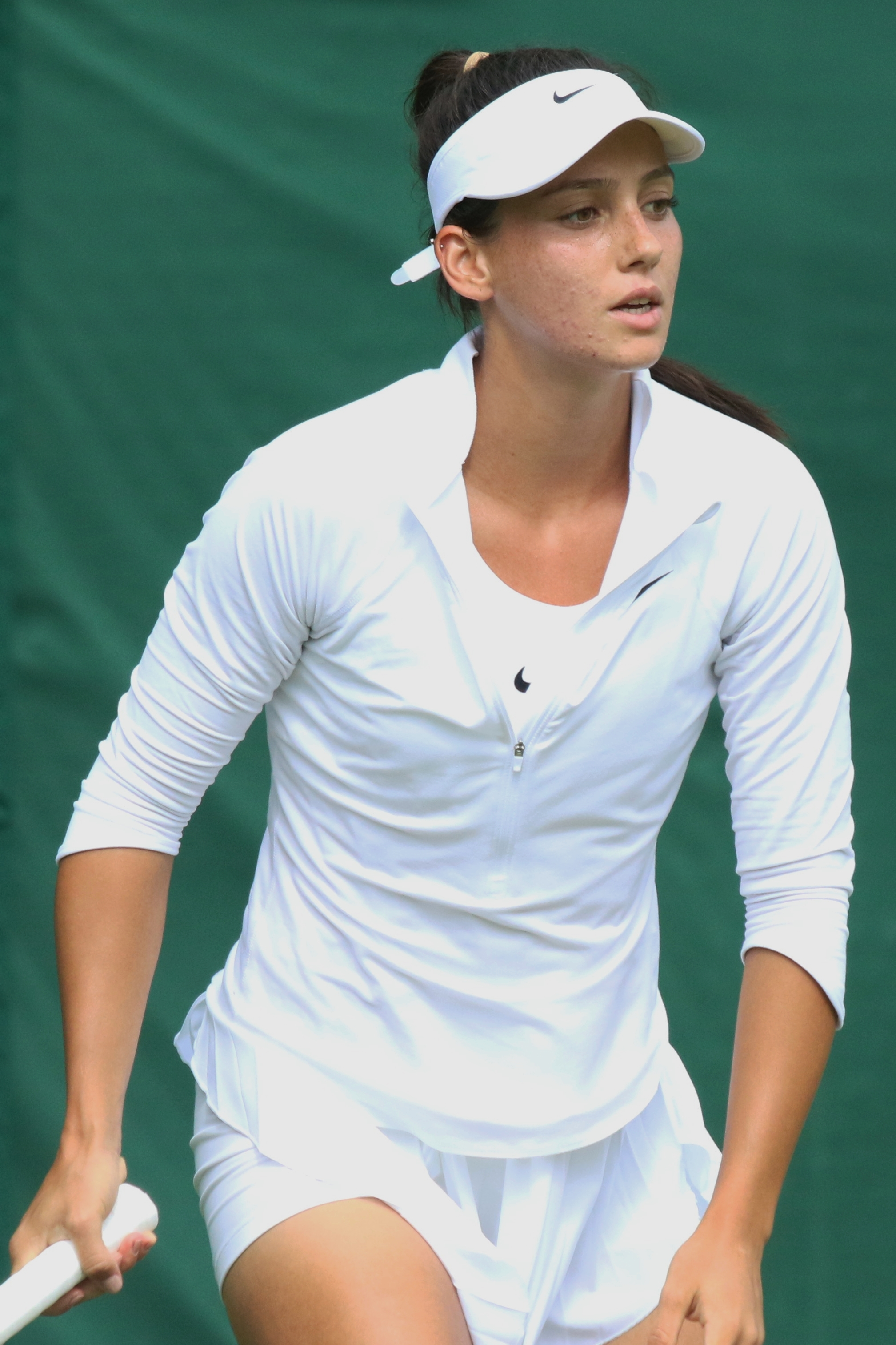 Soylu WMQ16 (16)